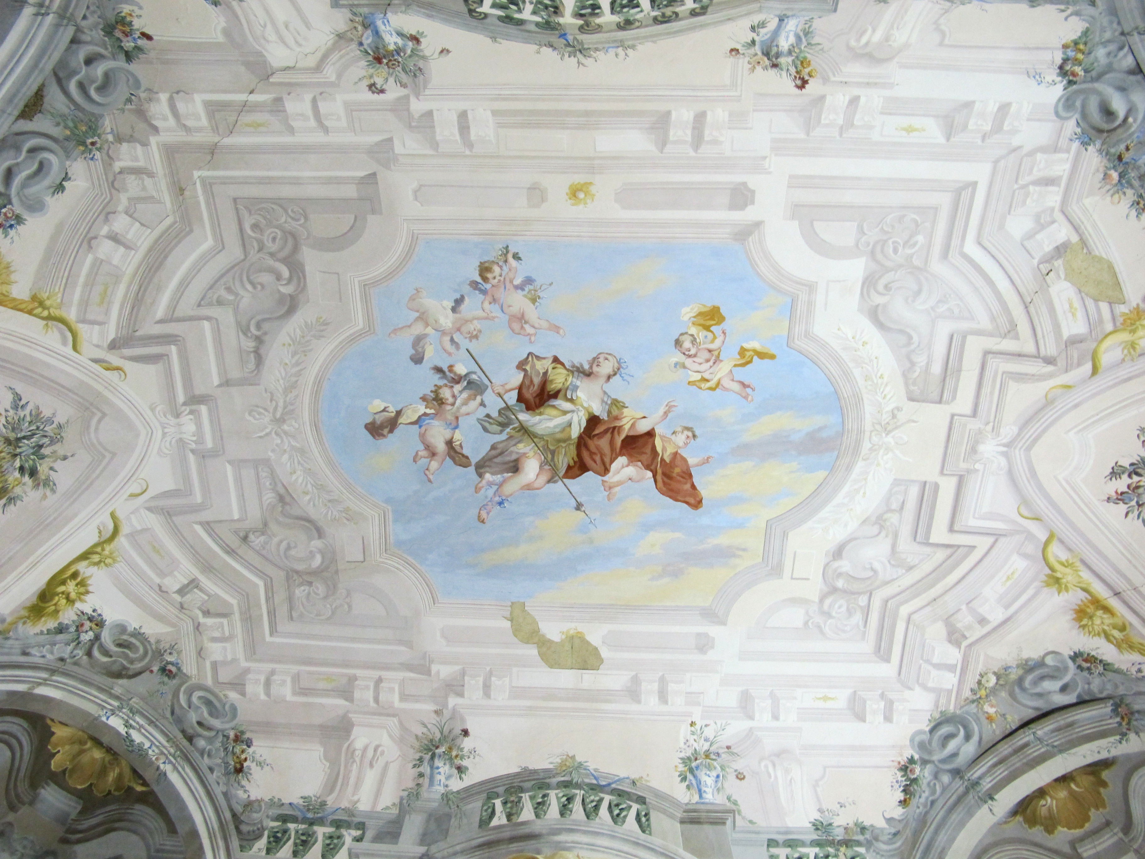 Villa del Barone (Montemurlo)